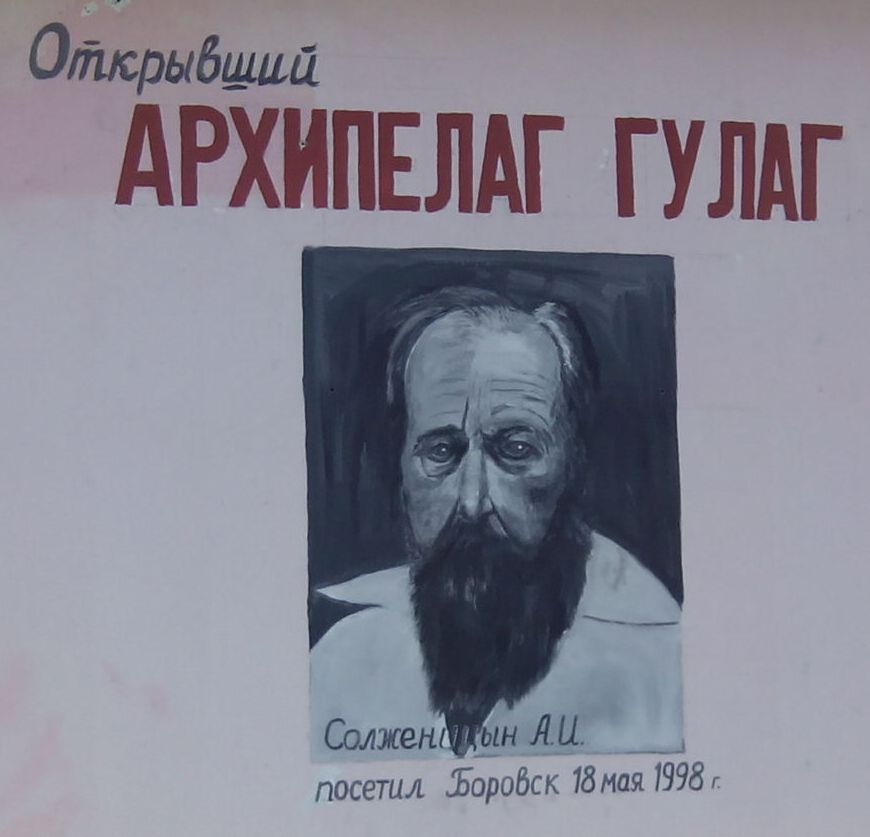 Солженицын, Александр Исаевич - рисунок художника В. А. Овчинникова из галереи репрессированных